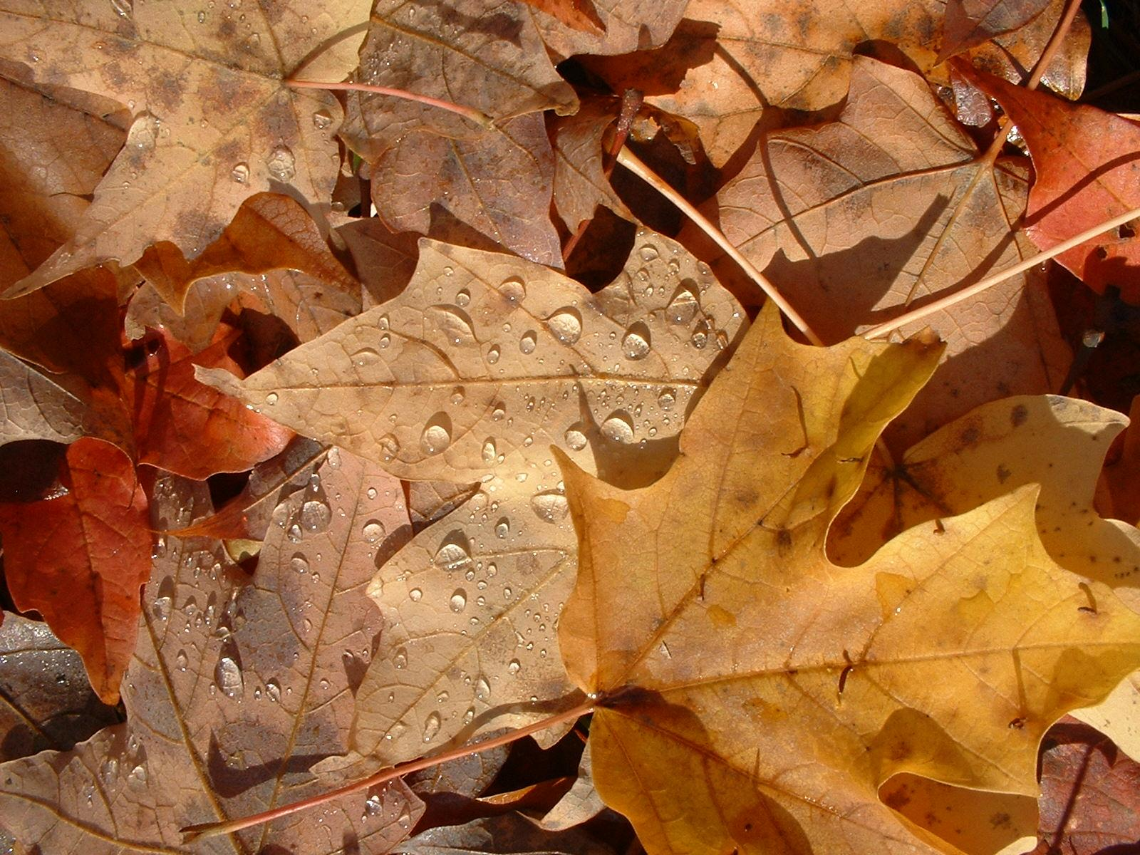 Autumn leaves